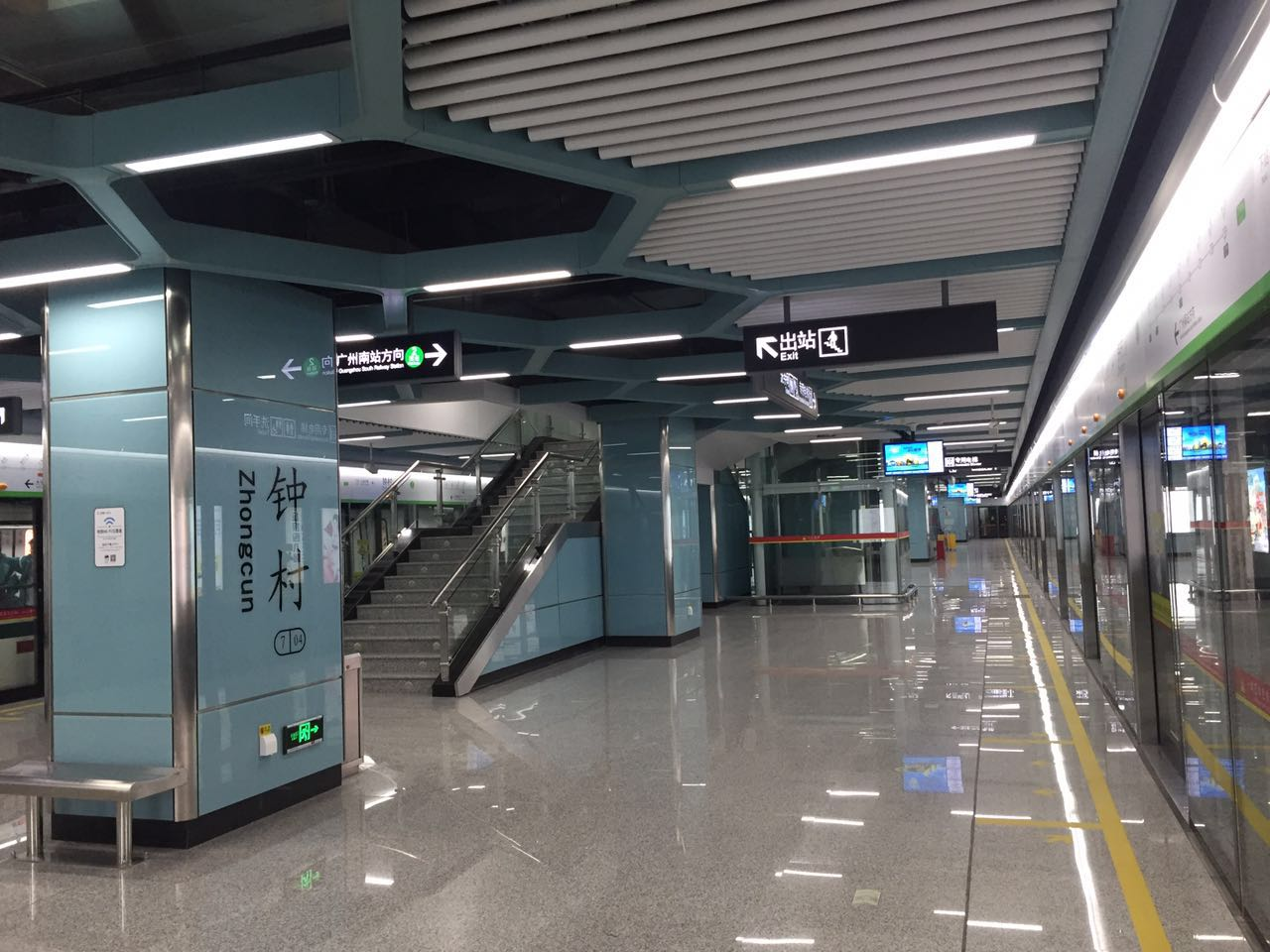 广州地铁钟村站